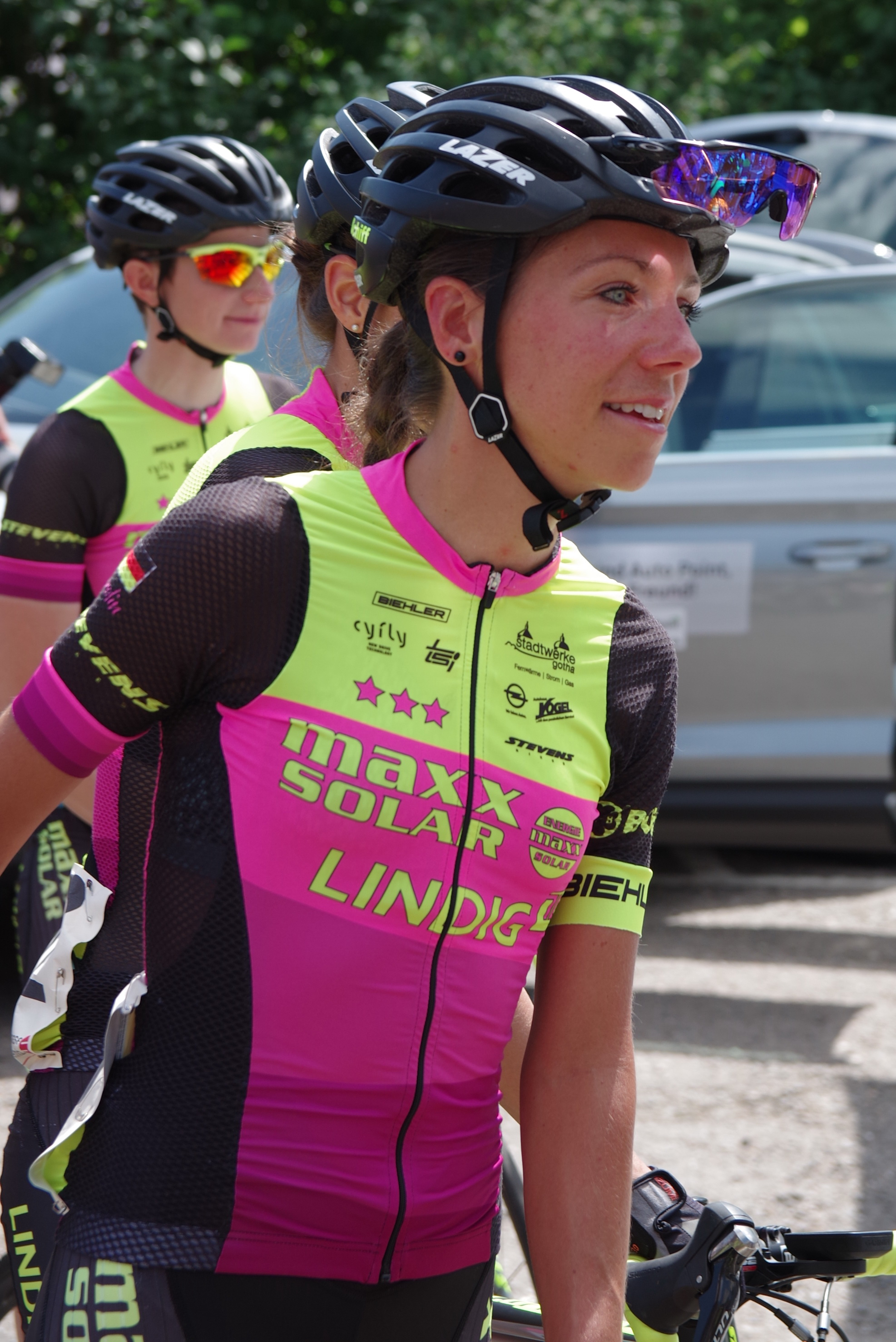 Deutsche Meisterschaften im Straßenrennen 2017 (Frauen) 24. Juni 2017 Einschreibkontrolle The making of this document was supported by the Community-Budget of Wikimedia Germany.